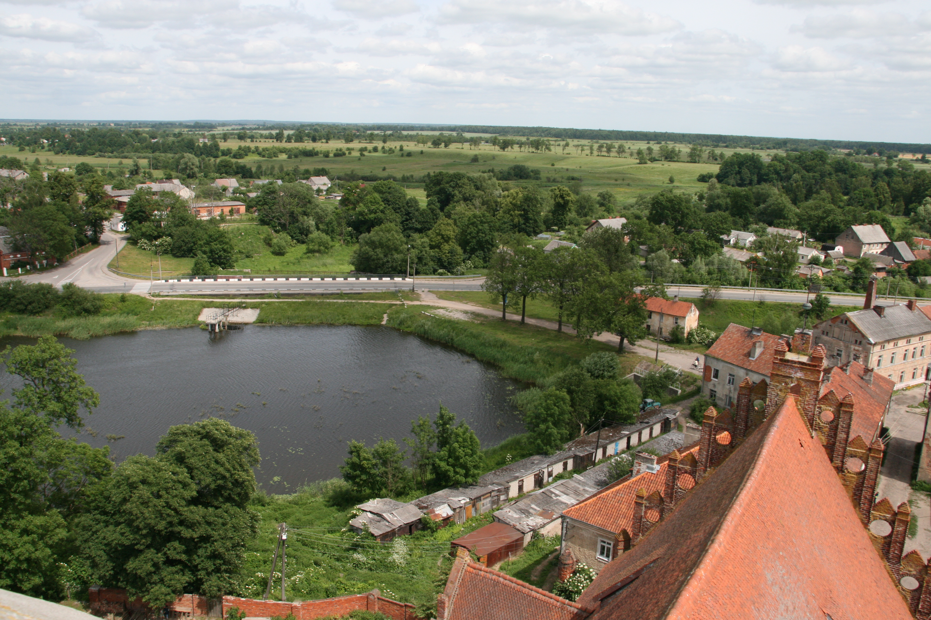 Der Mühlenteich vom Turm der St. Georgs-Kirche gesehen. (Juni 2011)